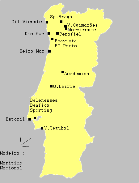 carte des clubs du championnat du portugal de football 2004-05